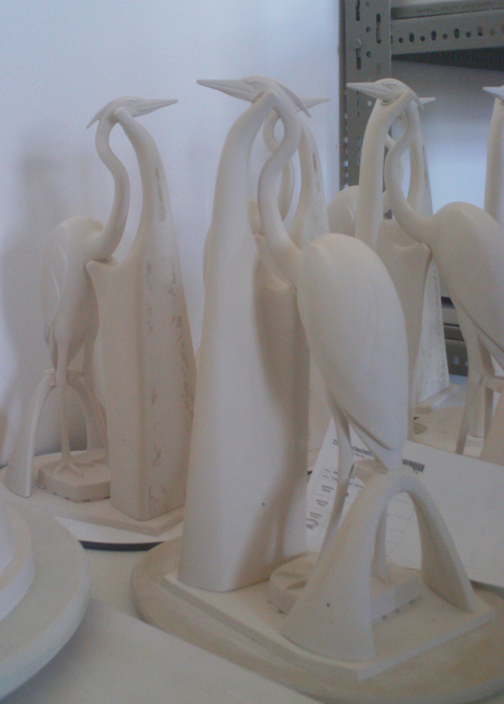 Ungebrannte Porzellanfiguren mit Bomsen als Brennhilfsmittel